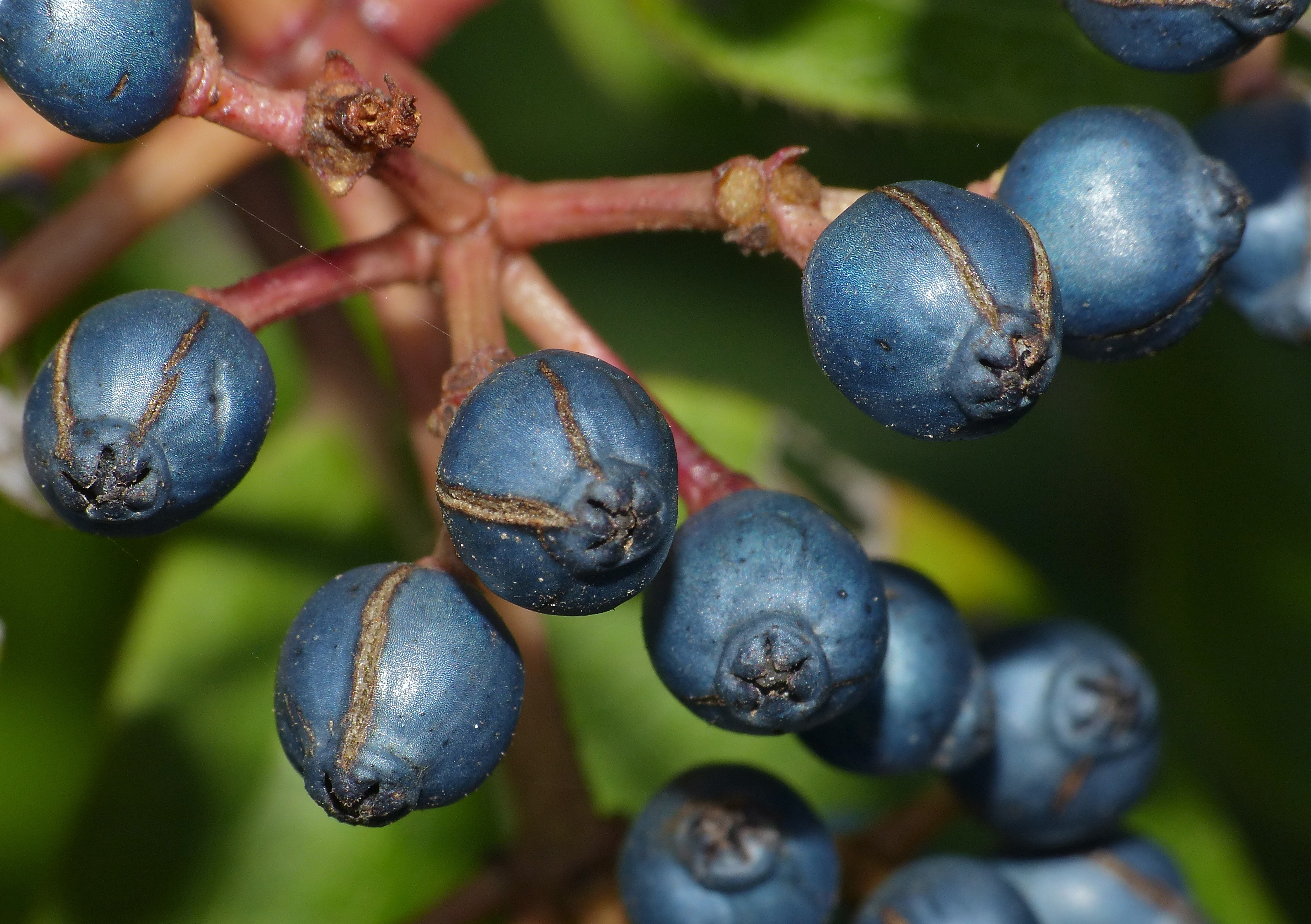 Valcrose, Aniane, Hérault, FRANCE